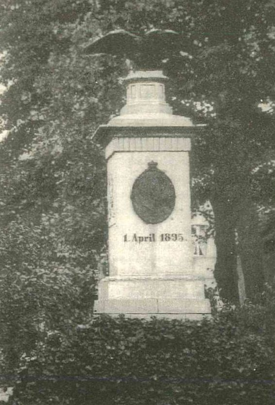 Bismarck-Denkmal auf dem Kirchplatz in Ruhland, 1945 zerstört